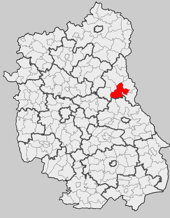 Map of gmina Hańsk, Włodawa county, Lublin voivodship Mapa gminy Hańsk, powiat włodawski, województwo lubelskie